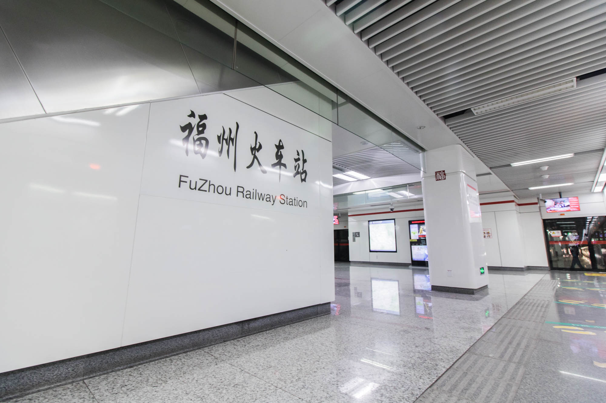 中文（中国大陆）: 福州地铁1号线福州火车站站